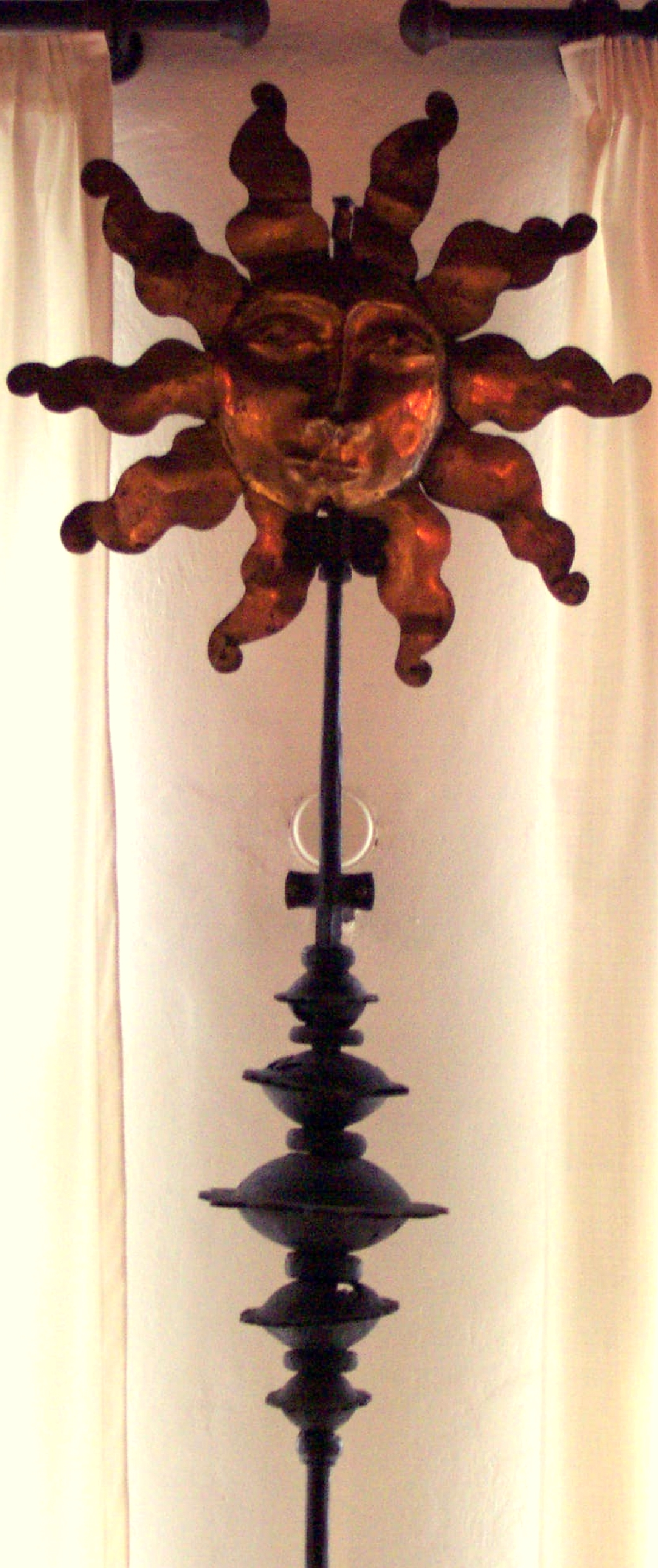 Die Goldene Sonne von Neuhaus im Muzeum Cheb